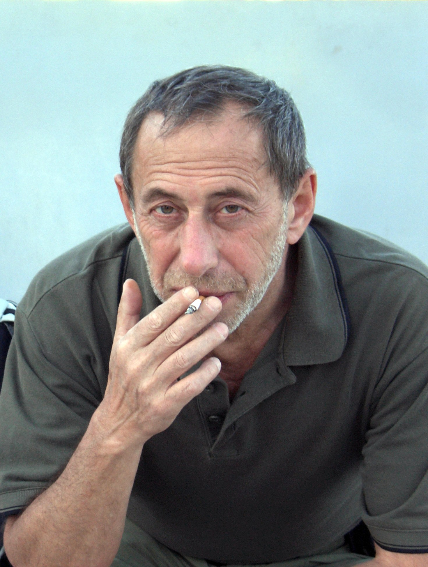 Кордонский Симон Гдальевич